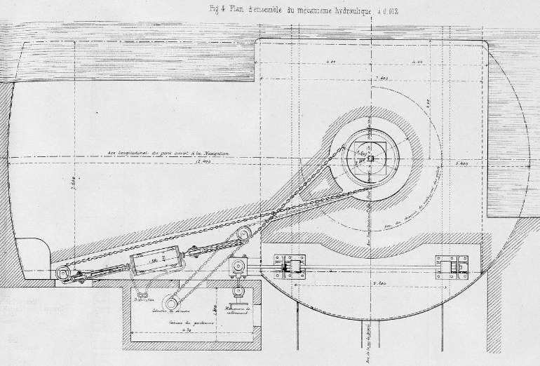 Nouveau pont métallique du canal de l'Ourcq à Paris (Villette) - manœuvre par pression hydraulique : fig. 4 Plan d'ensemble du mécanisme hydraulique.